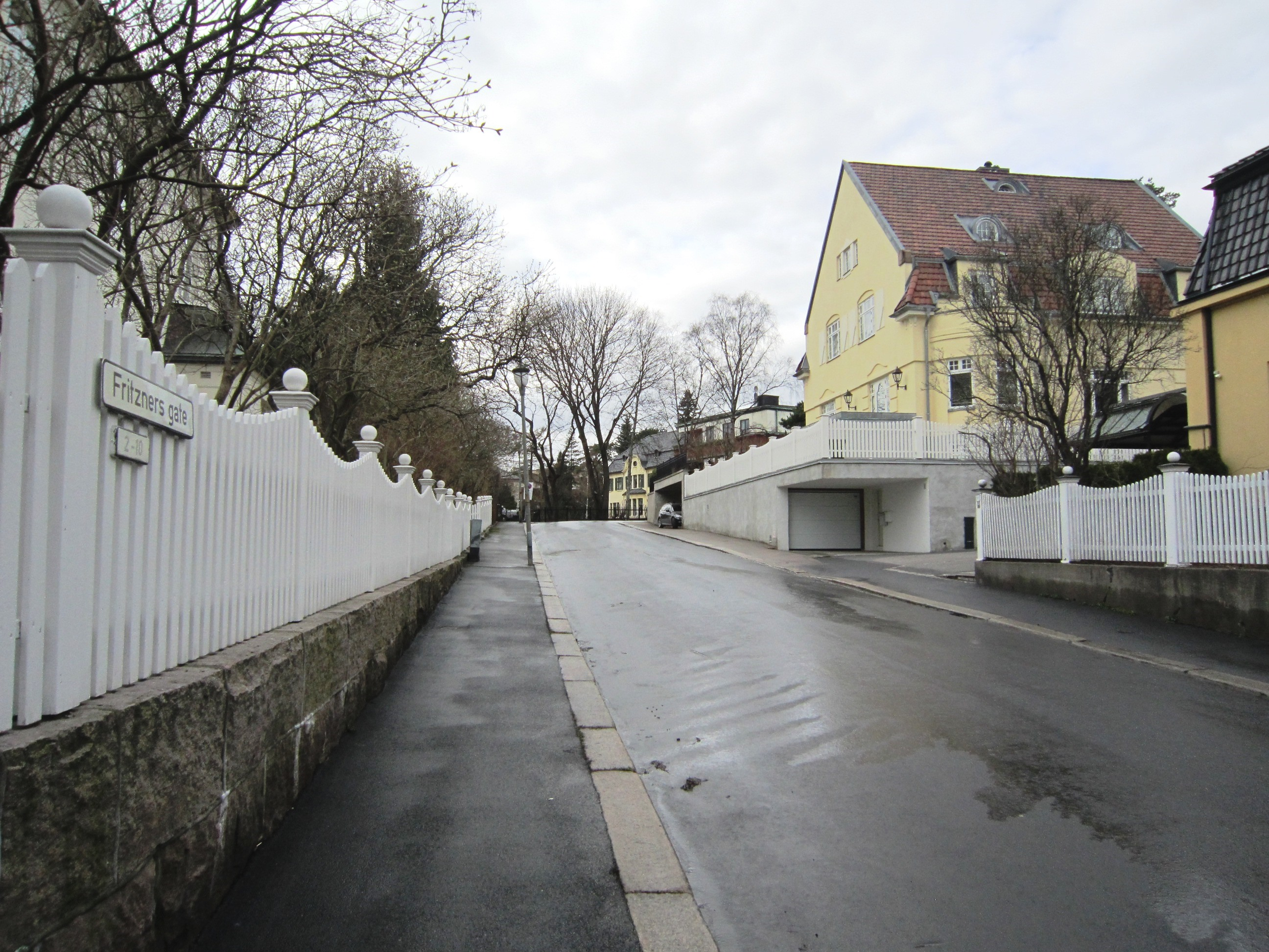 Fritzners gate